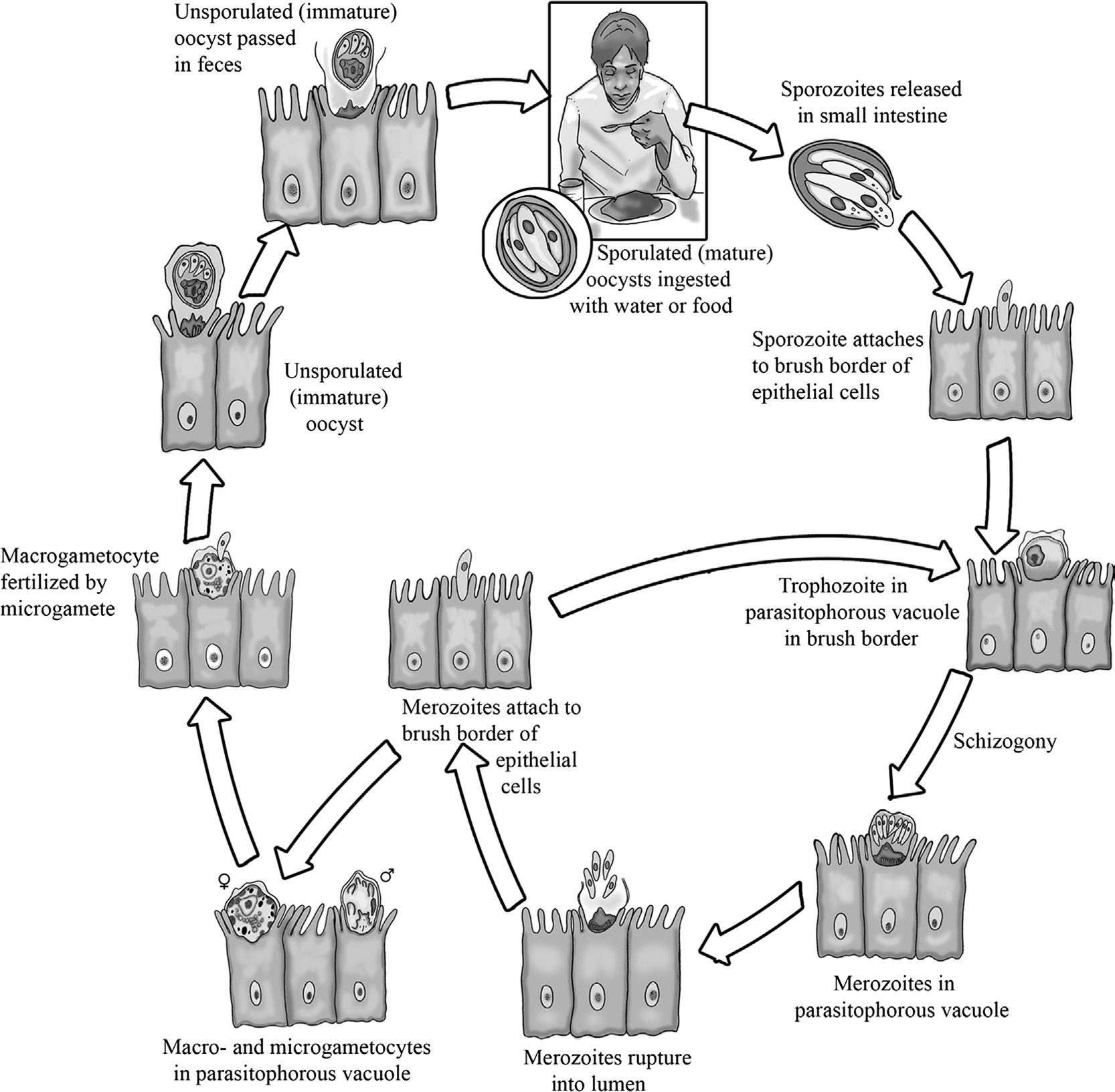 Životní cyklus Crpytosporidium parvum.